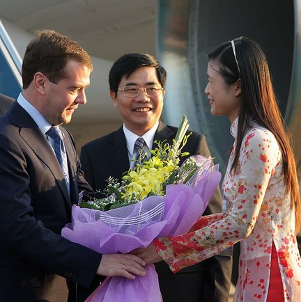 В аэропорту Ханоя.